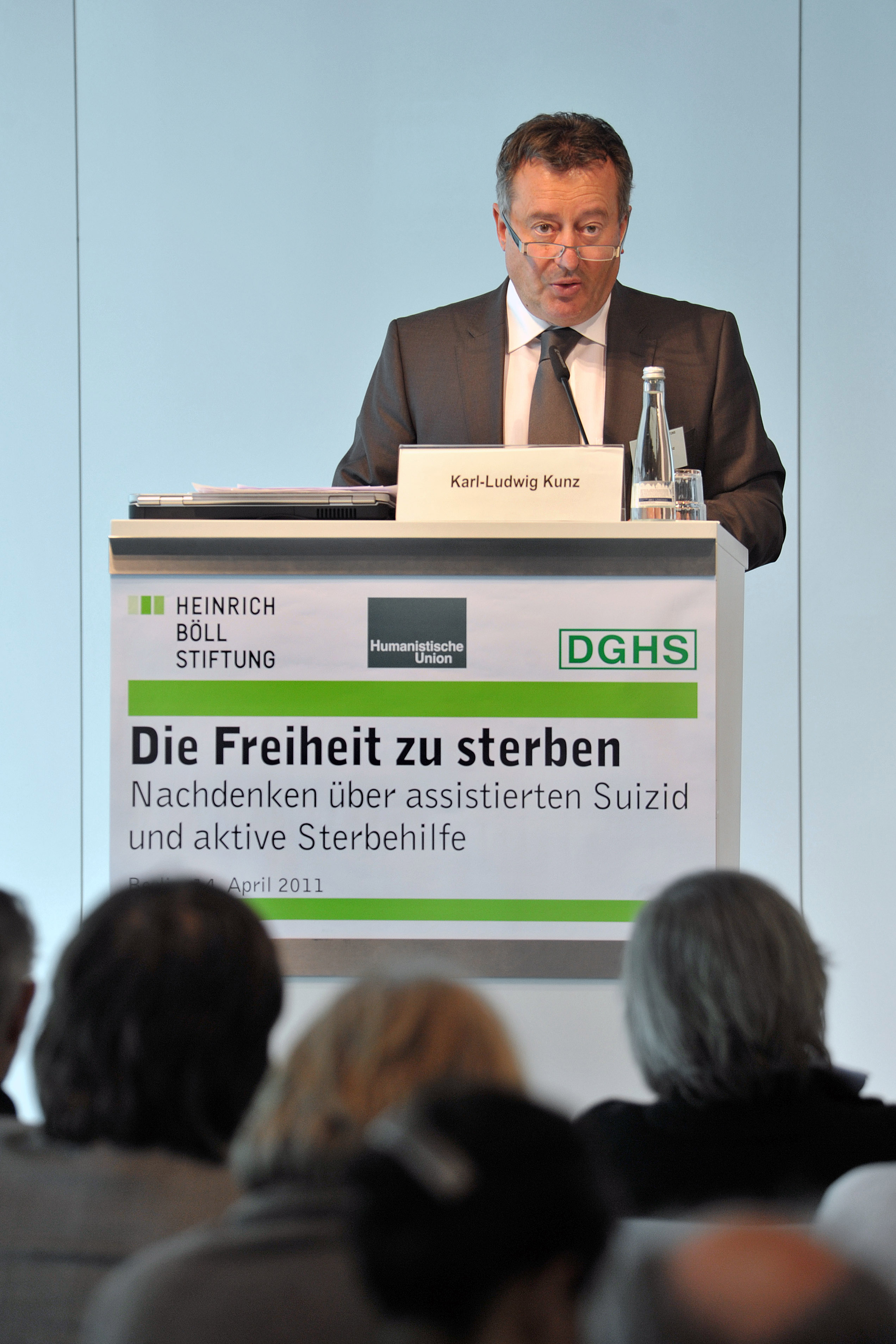 Prof. Dr. Karl-Ludwig Kunz, Universität Bern, Institut für Strafrecht und Kriminologie. Foto: Heinrich-Böll-Stiftung/xpress